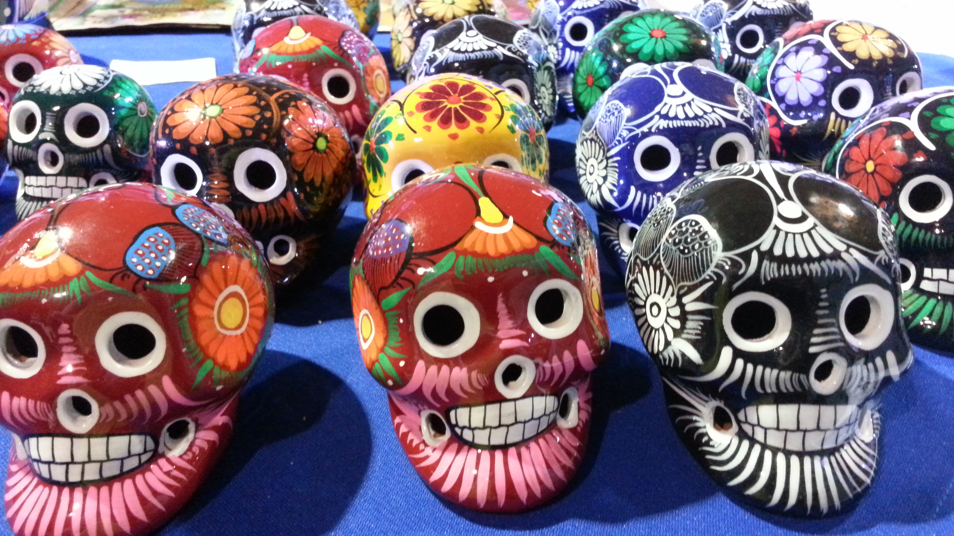 calaveras del dia de los muertos